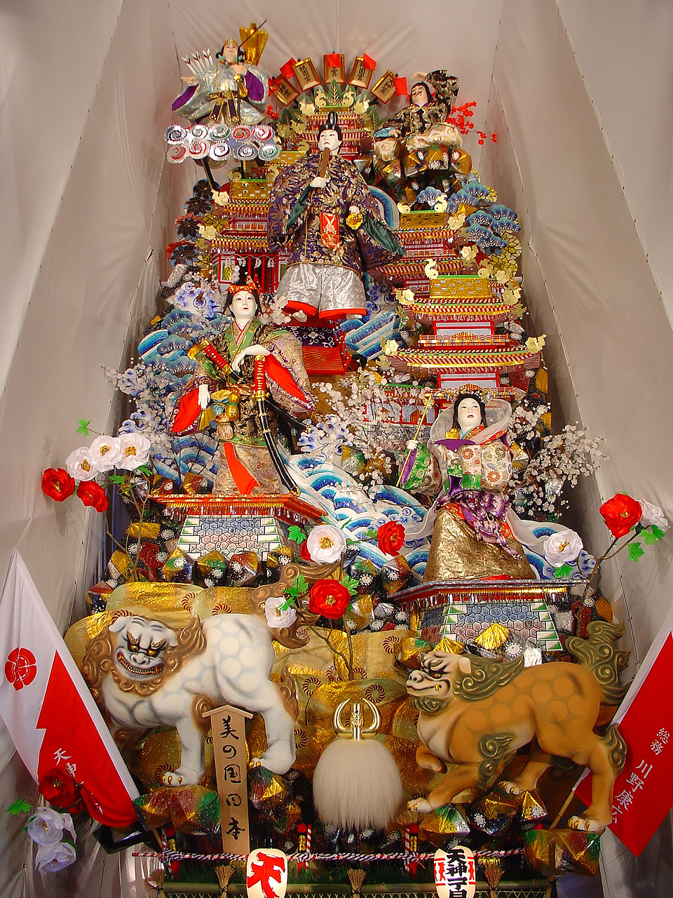 Hakata Gion Yamakasa, Kazariyama.(Fukuoka City, Fukuoka Prefecture, Japan)